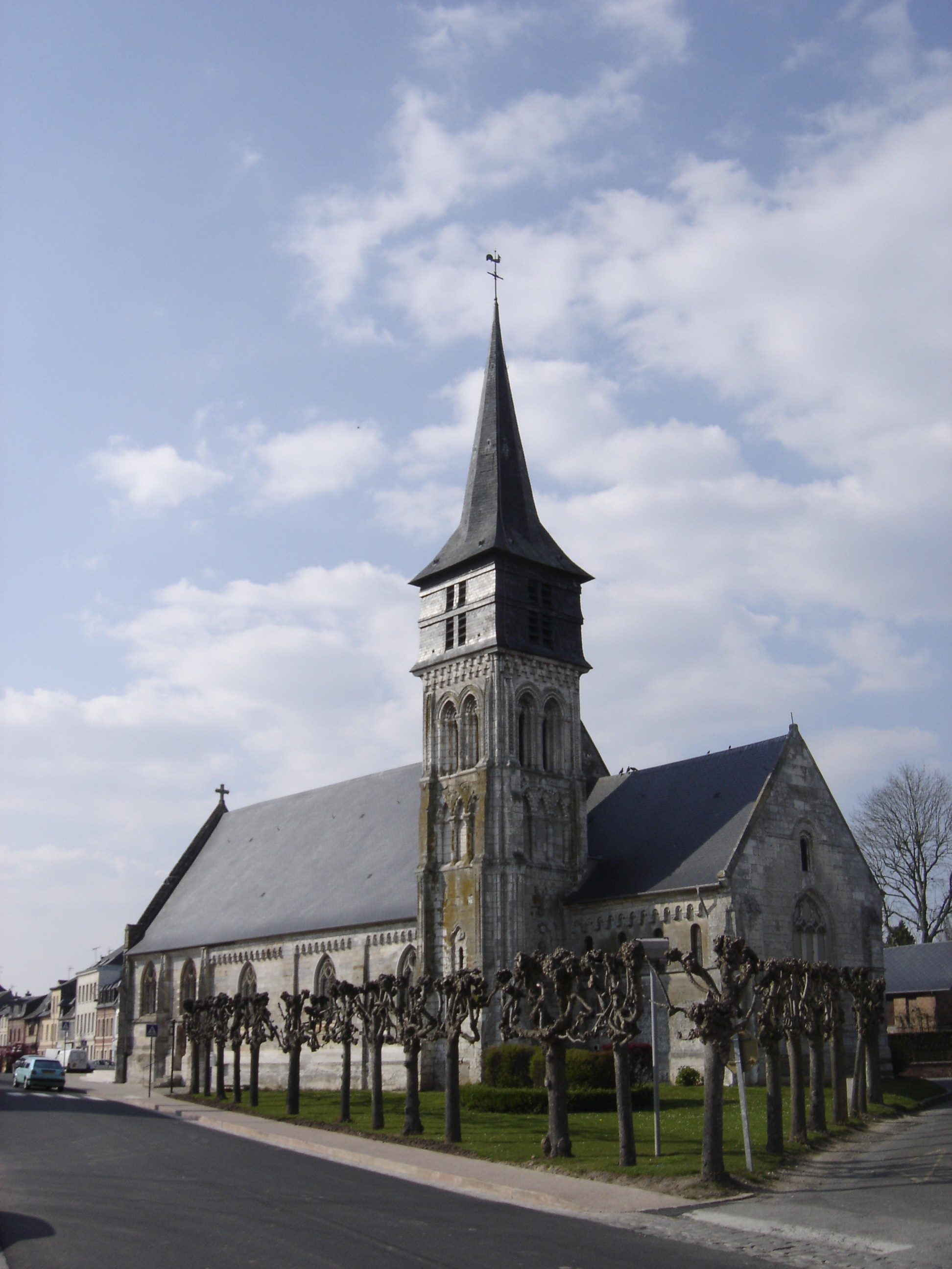 Eglise de Routot - Eure - France